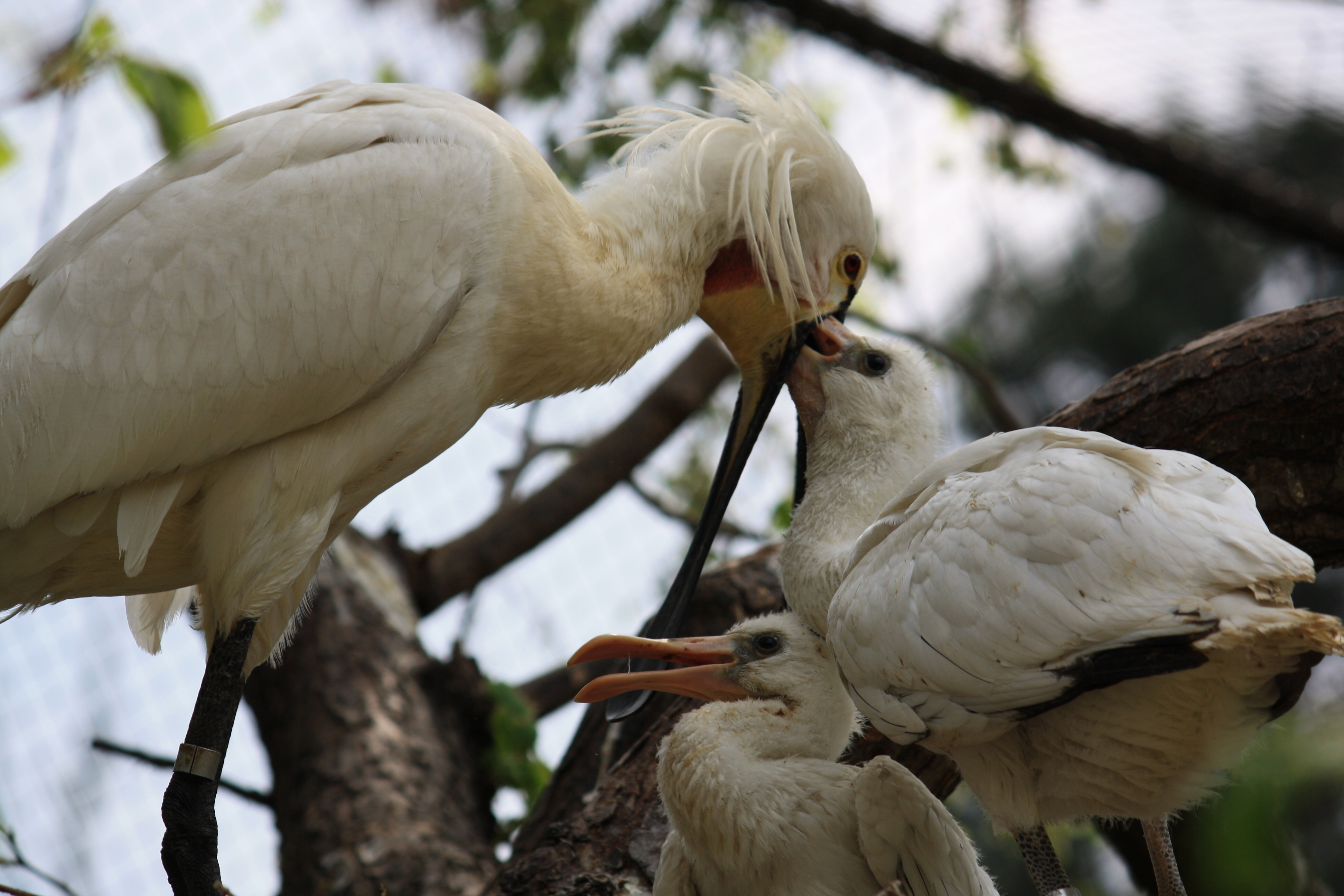 Kolpík bílý na hnízdě - krmení mláďat Samice snáší 4 až 5 vajec bílé barvy. O mláďata se starají oba rodiče, krmení probíhá asi dva měsíce. V Pražské zoo umístěni v průchozí voliéře a hnízdění je tak možné pozorovat bez mříží z několika metrů.